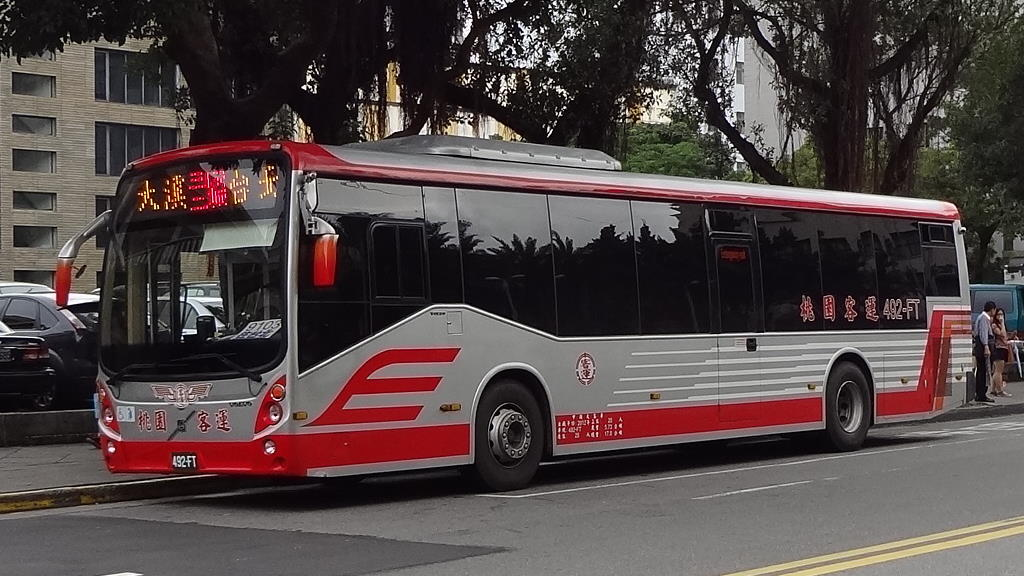 桃園客運的Volvo B7RLE ALLWIN大客車492-FT